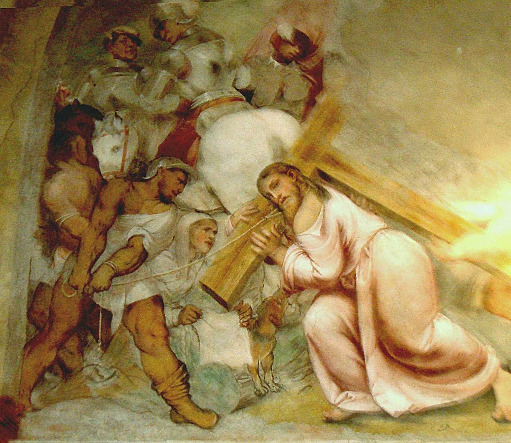 Gerolamo di Romano called Romanino, "Christ Carrying the Cross" (detail) , 1533-34, fresco, Church of Santa Maria della Neve, Pisogne (BG), Italy